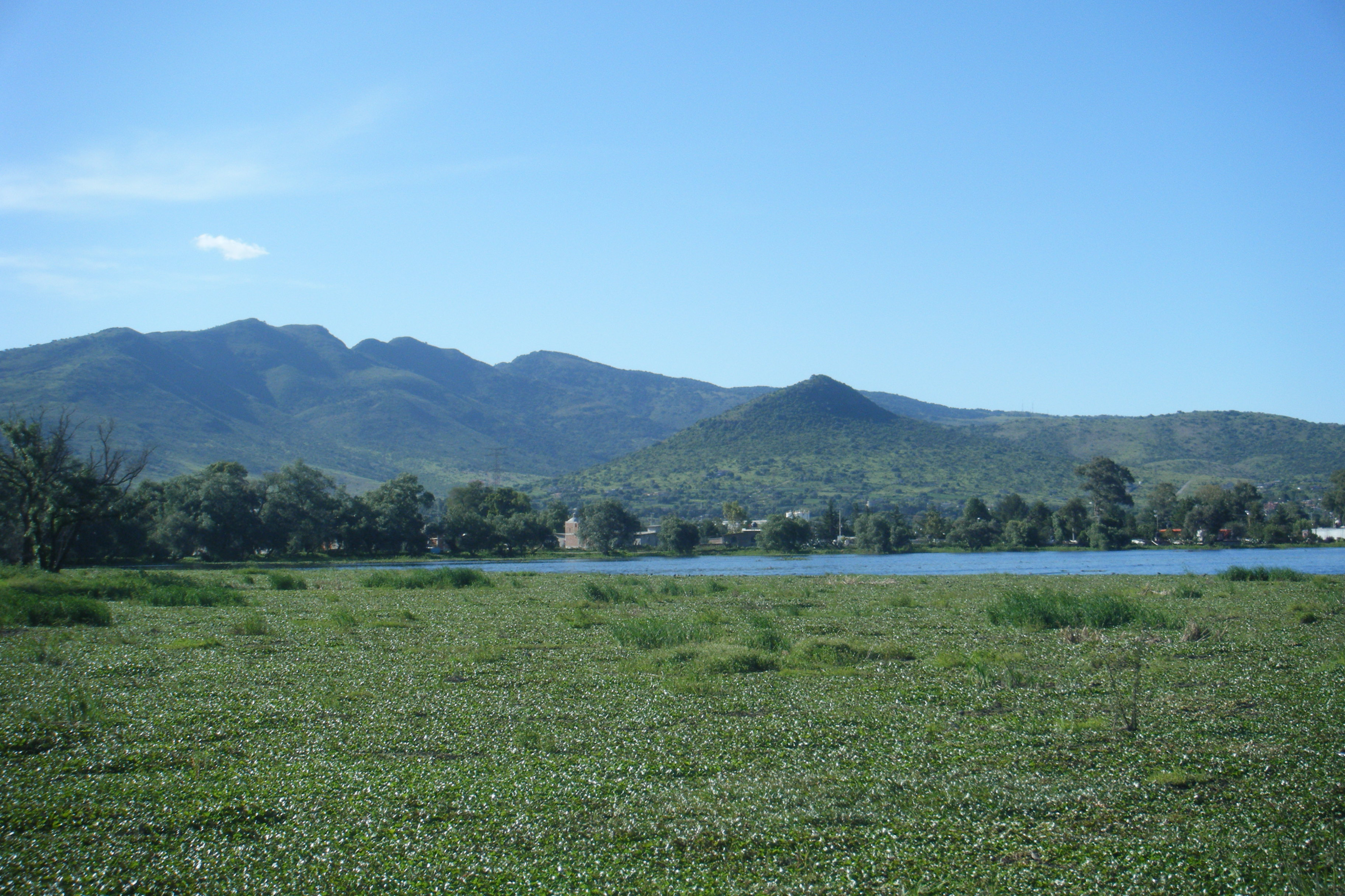 Laguna de Axotlán y Sierra de Tepotzotlán a finales de verano.